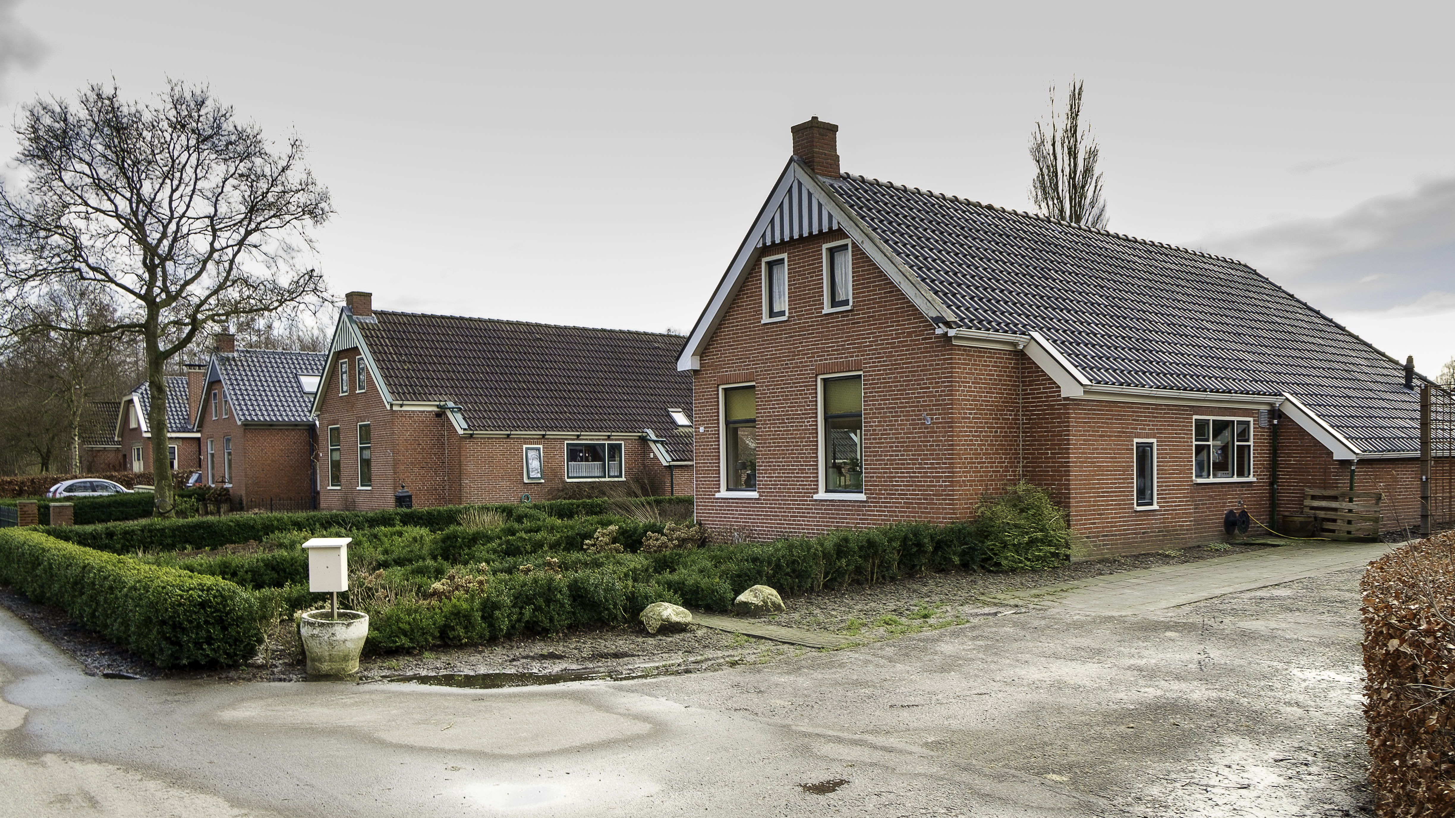 Krimpjes langs de Kwekerijweg in Zeerijp